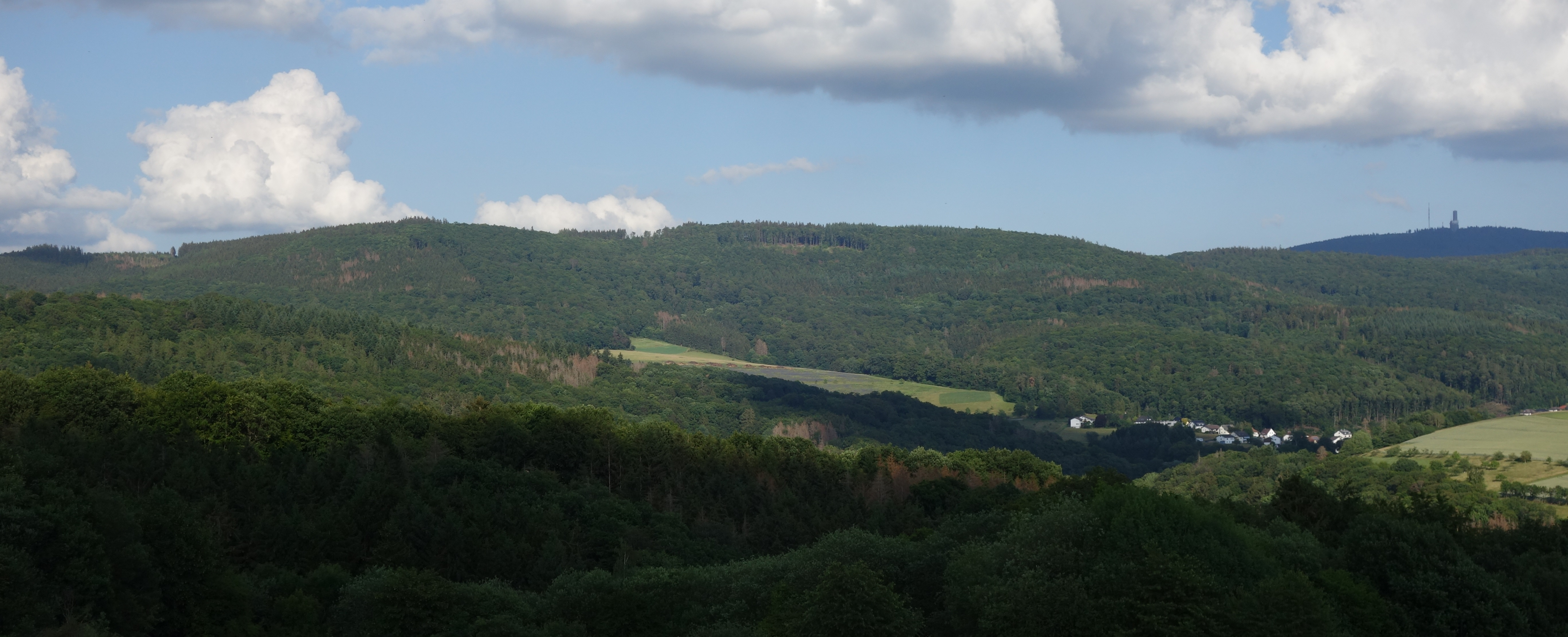 Windhain über Waldems-Wüstems von der Siedlung Reinborn gesehen, aus Richtung Westen. Links im Bildmittelgrund der Berg "Burg", auf dem sich der Ringwall Waldems befindet